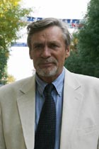 Актёр театра и кино Александр Яковлевич Михайлов на Немецкой улице города Саратова